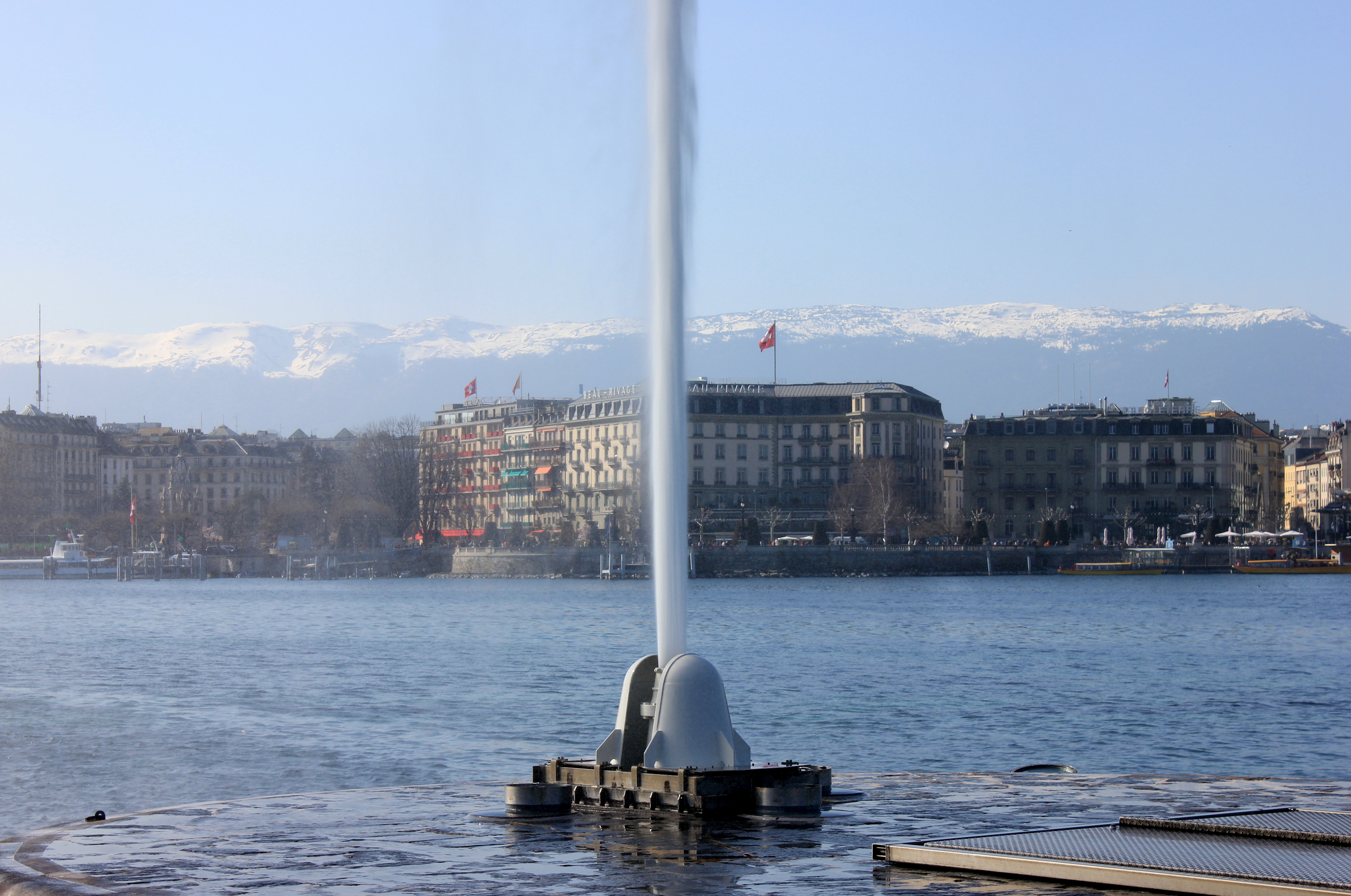 Jet d'eau de Genève sur le lac Léman